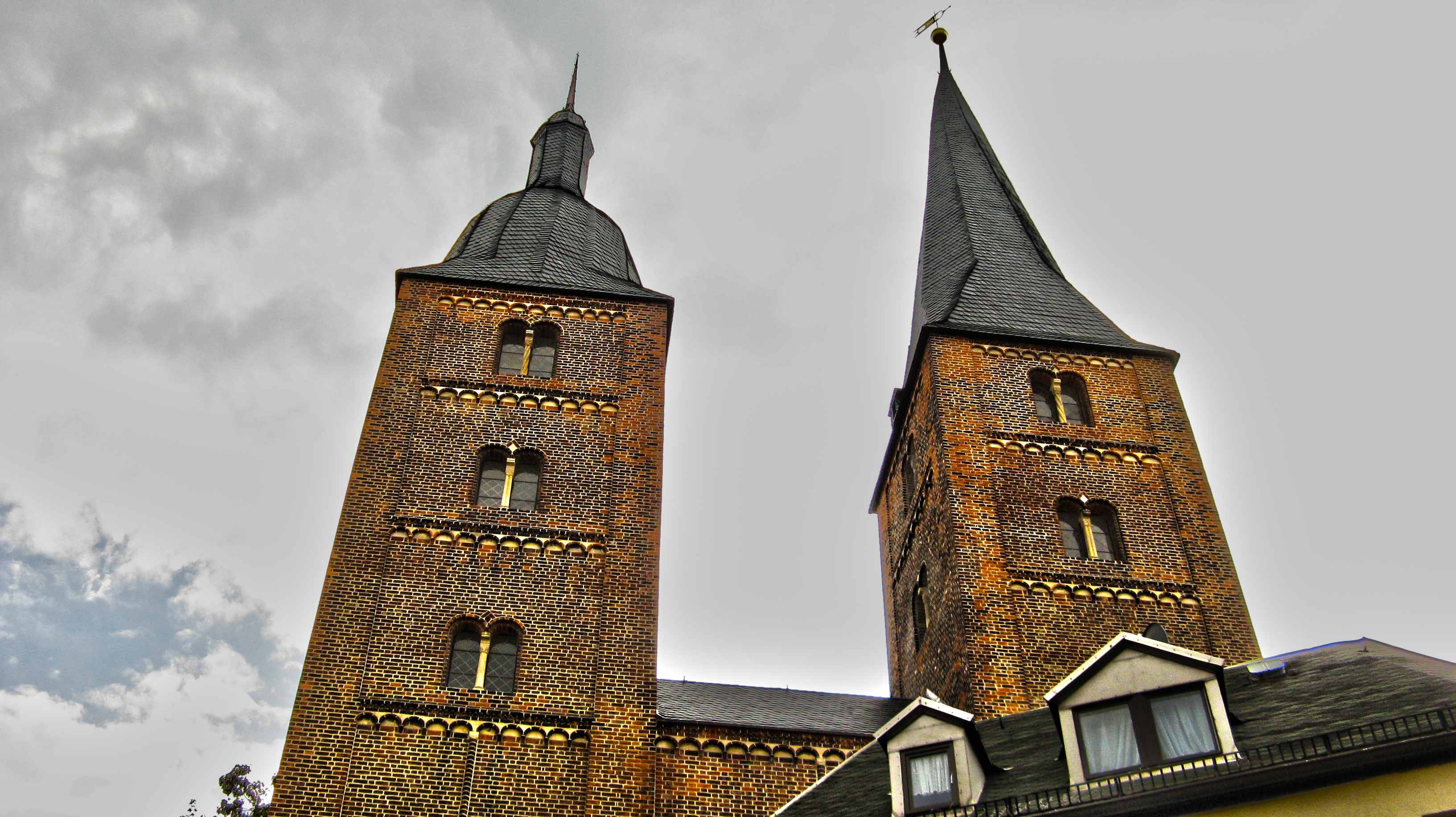 Die sogenannten Roten Spitzen von Altenburg. Eines der bekanntesten Wahrzeichen Altenburgs. Eine Aufnahmne vom 09.11.2011